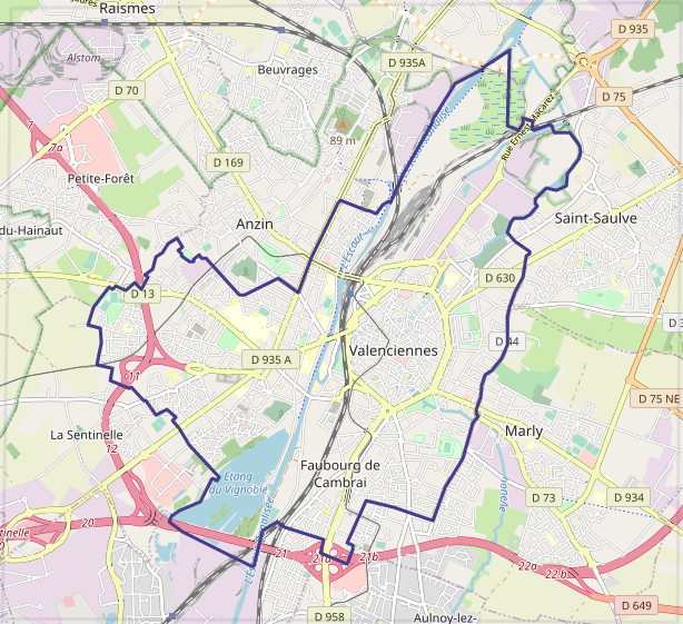 carte réalisée sur umap This map may be incomplete, and may contain errors. Don't rely solely on it for navigation.